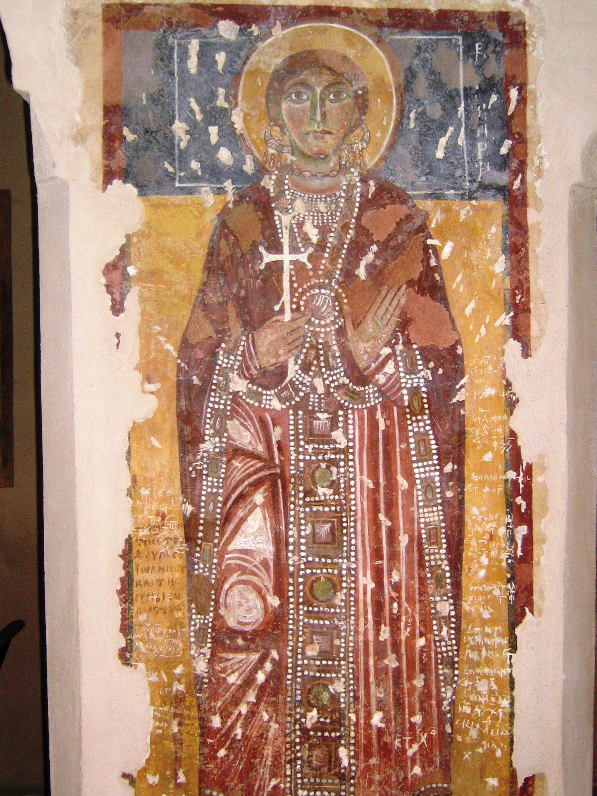 Chiesa di Casaranello Affresco